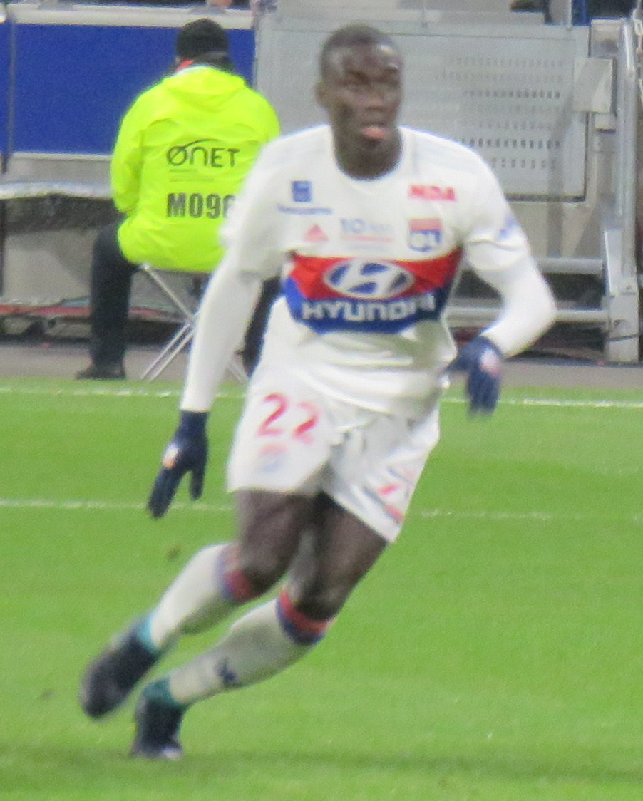 Ferland Mendy lors du match Lyon-Montpellier (Ligue 1).